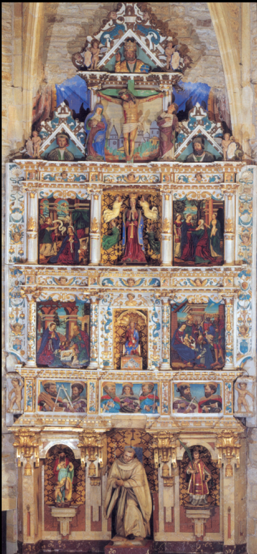 Santa Maria elizako erretaula, Markina